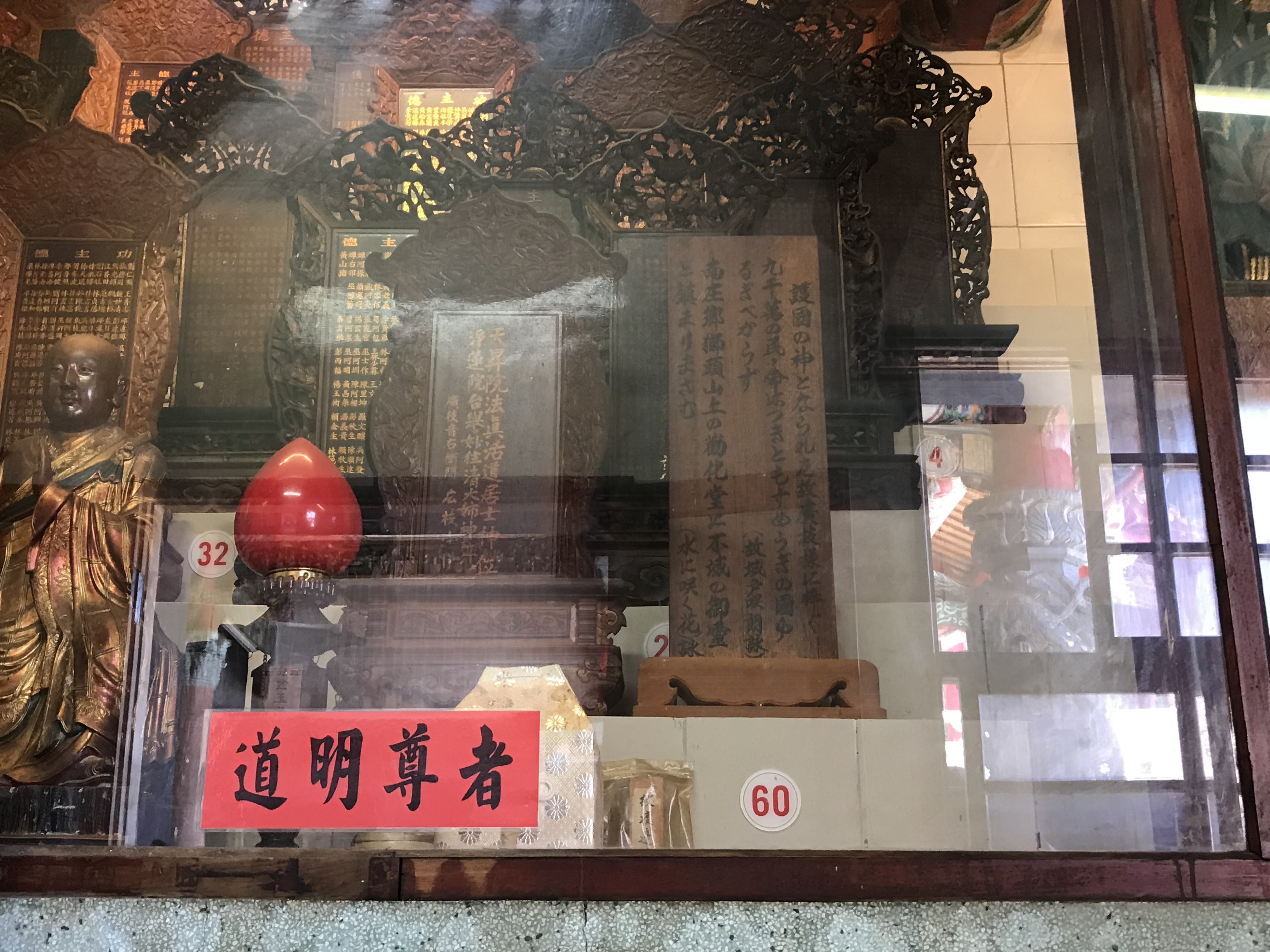 中文（台灣）: 廣枝音右衛門牌位